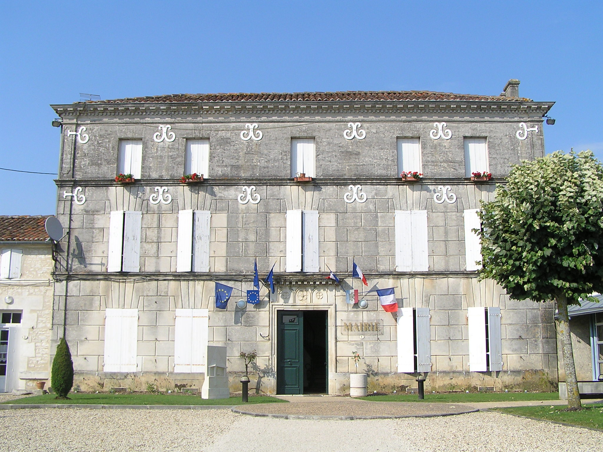 mairie de Julienne